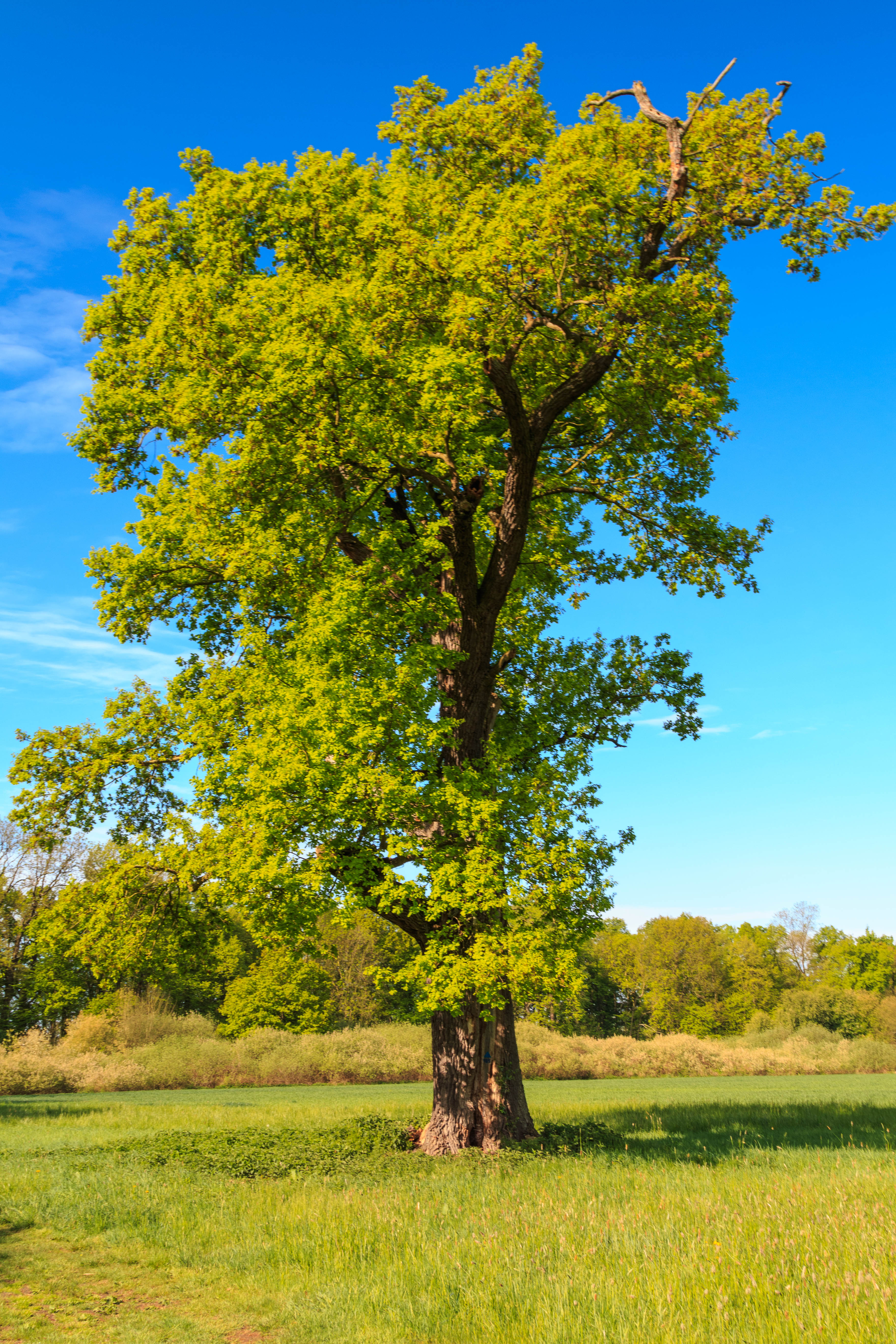 Přírodní památka Kačina Project: Chráněná území.